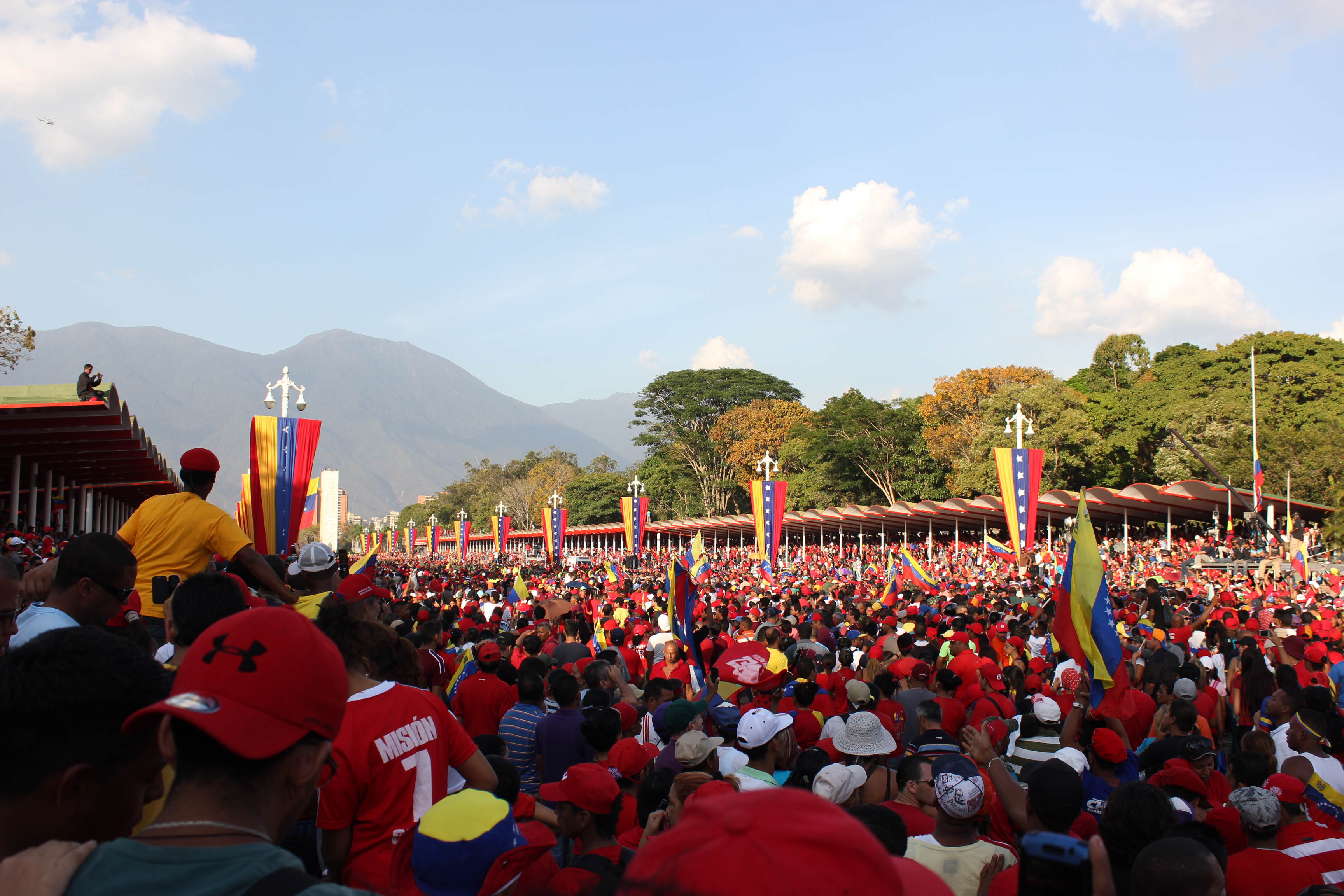 Paseolo los Próceres, cortejo fúnebre de Hugo Chavez.